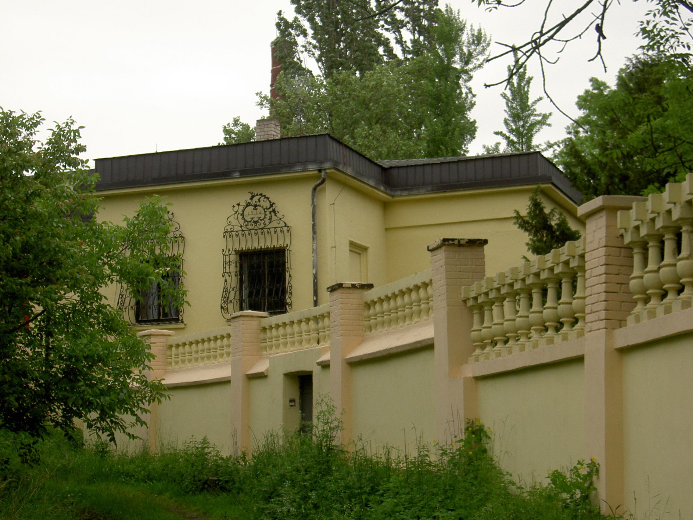 Praha-Hrdlořezy, Mezitraťová 343/26